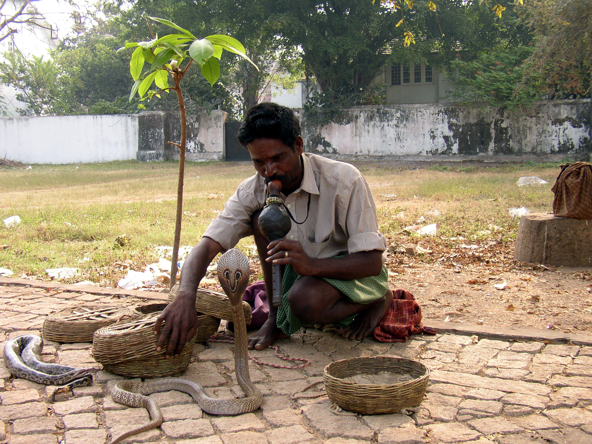 Schlangenbeschwörer in Fort Cochin (Indien)